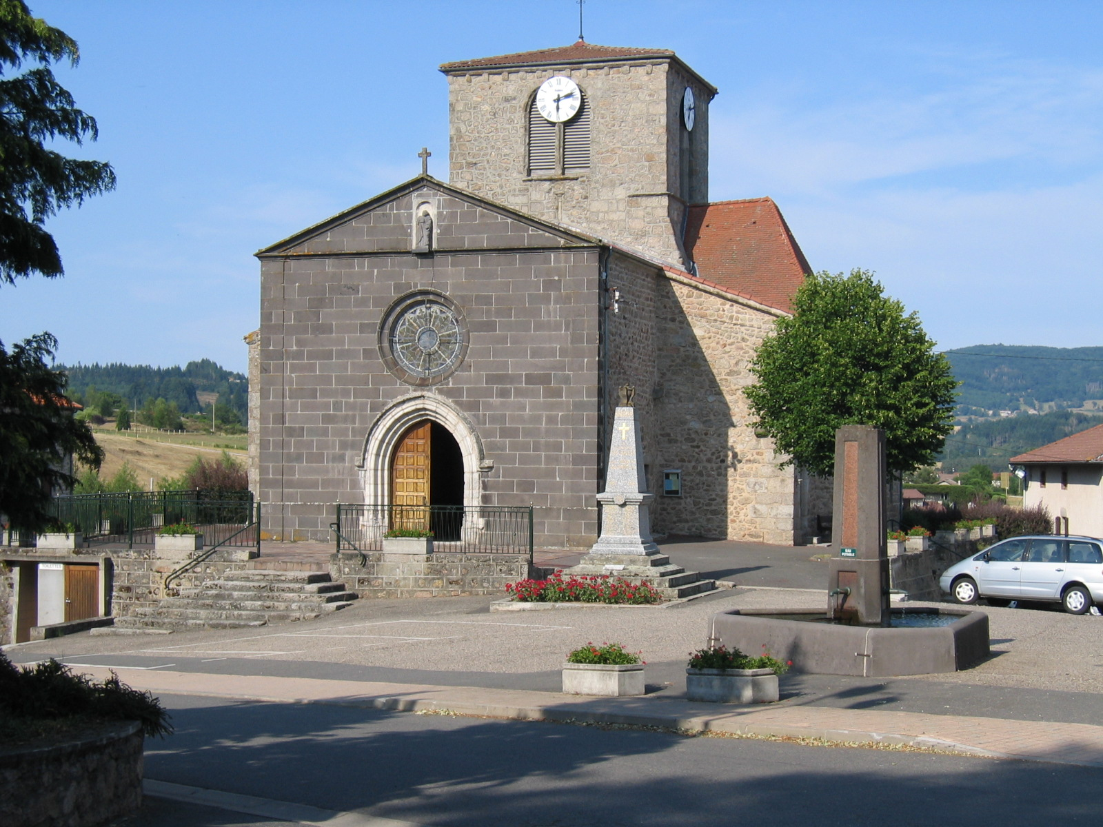 Les Salles- Place de l'Eglise et Eglise du 12 eme siecle